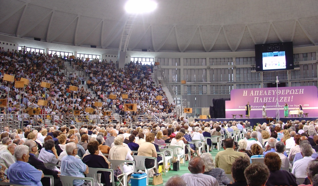 Άποψη από την ετήσια συνέλευση περιφερείας των Μαρτύρων του Ιεχωβά, που διεξάχθηκε στο Παλαί ντε Σπορ της Θεσσαλονίκης. (Θέμα: «Η Απελευθέρωση Πλησιάζει»)